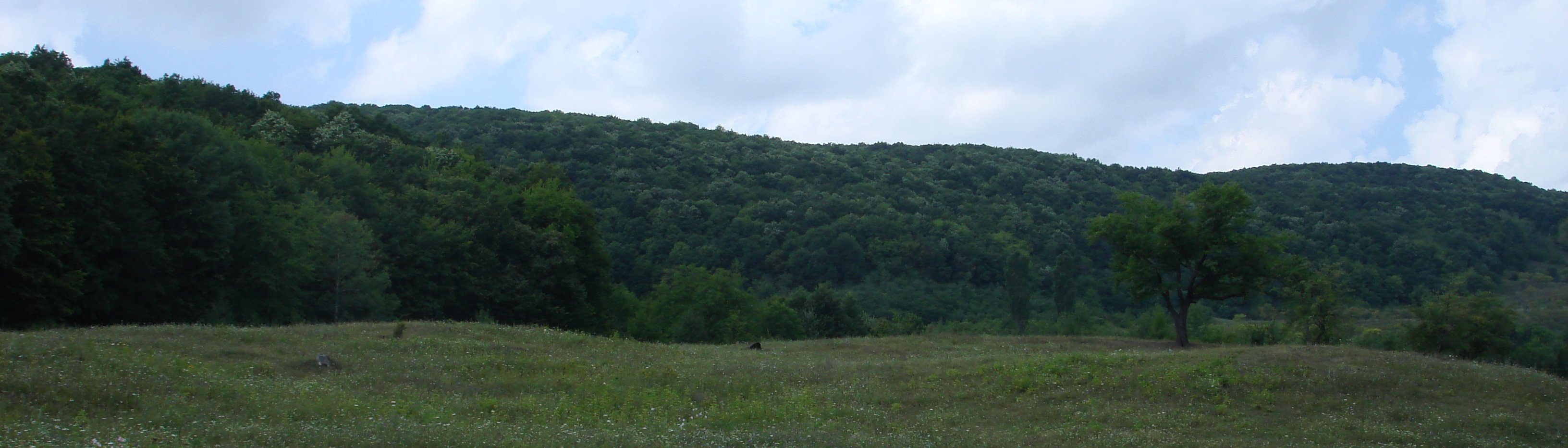 Пейзаж возле села Долна Страшенского района Молдавии